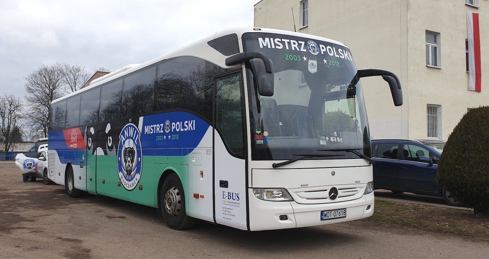 Mistrz Polski Anwil Włocławek